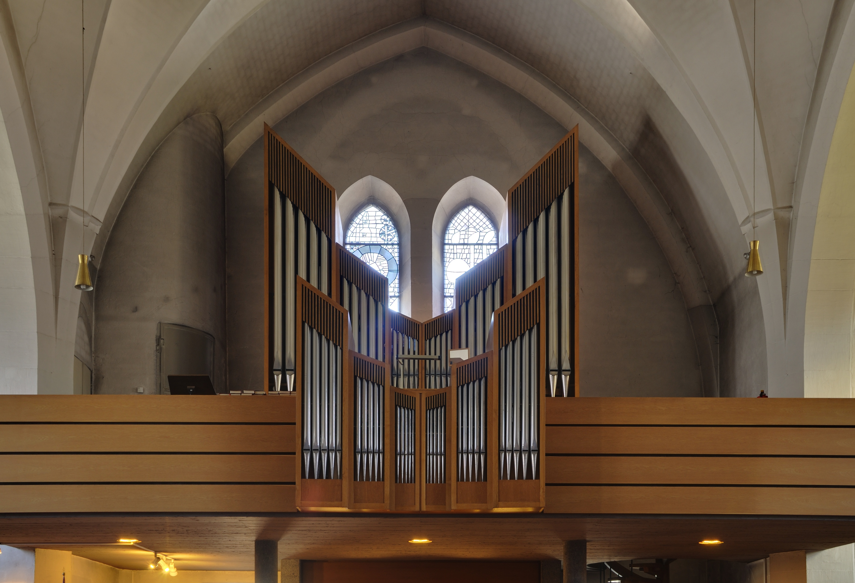 Wyhlen: Georgskirche, Orgelempore